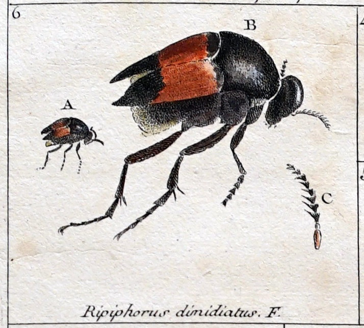 extrait de son livre d’entomologie.